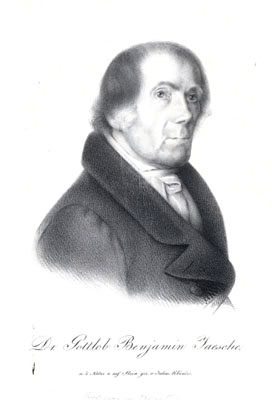 Gottlob Benjamin Jäsche portree